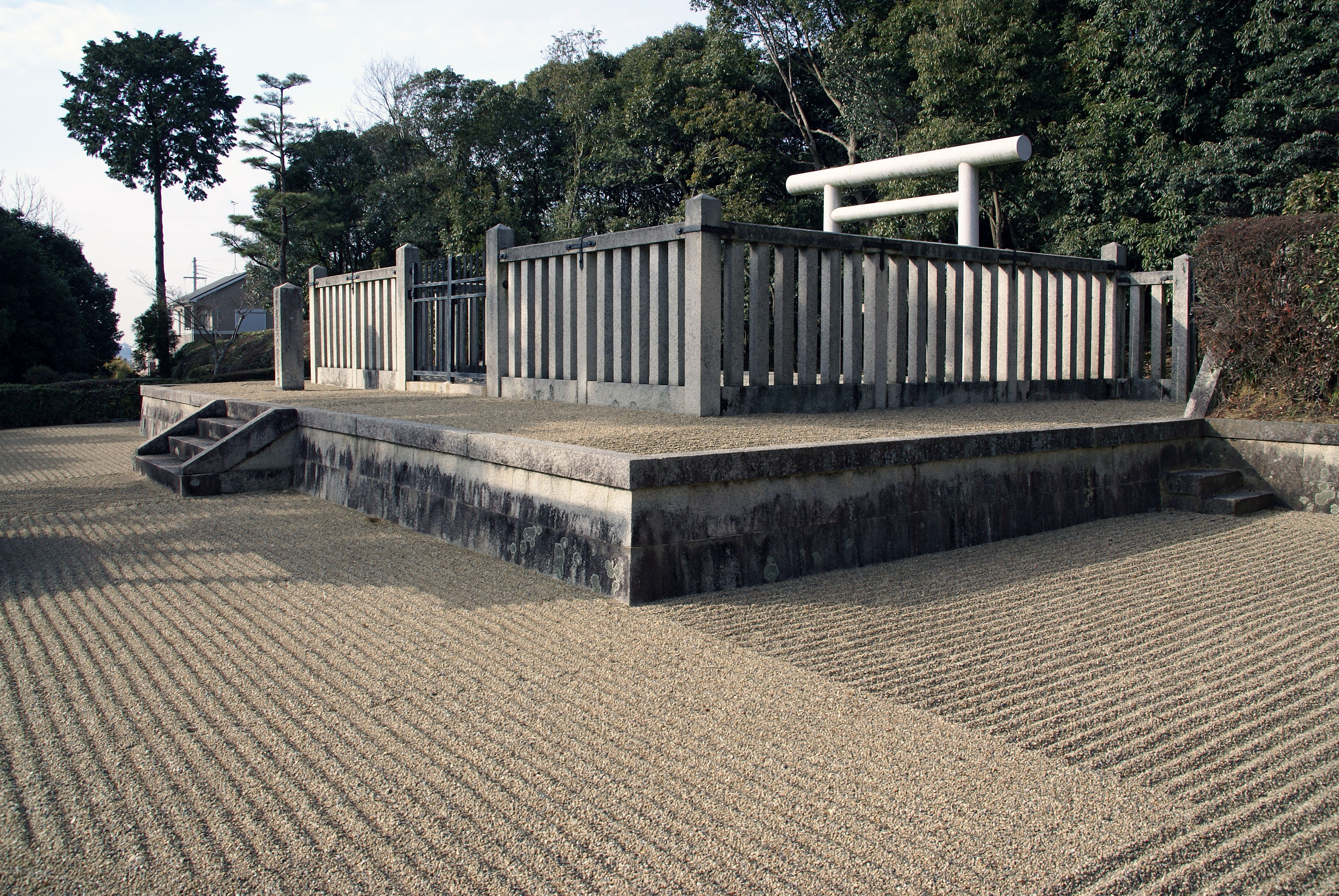 Yomei Tenno-ryo in Kanan, Osaka, Japan